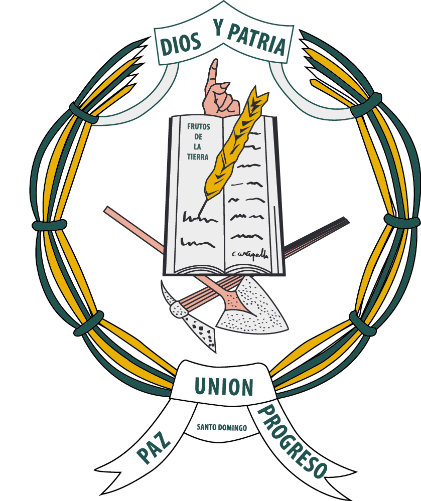 Este es el escudo del municipio de Santo Domingo, tierra de Don Tomás Carrasquilla.